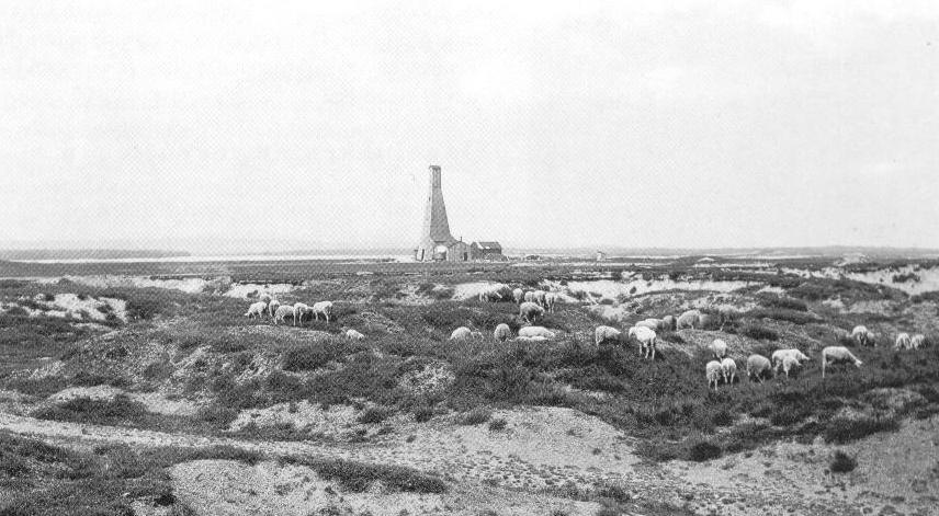 Langs de Zetellaan in Eisden, Maasmechelen. Gesloopt